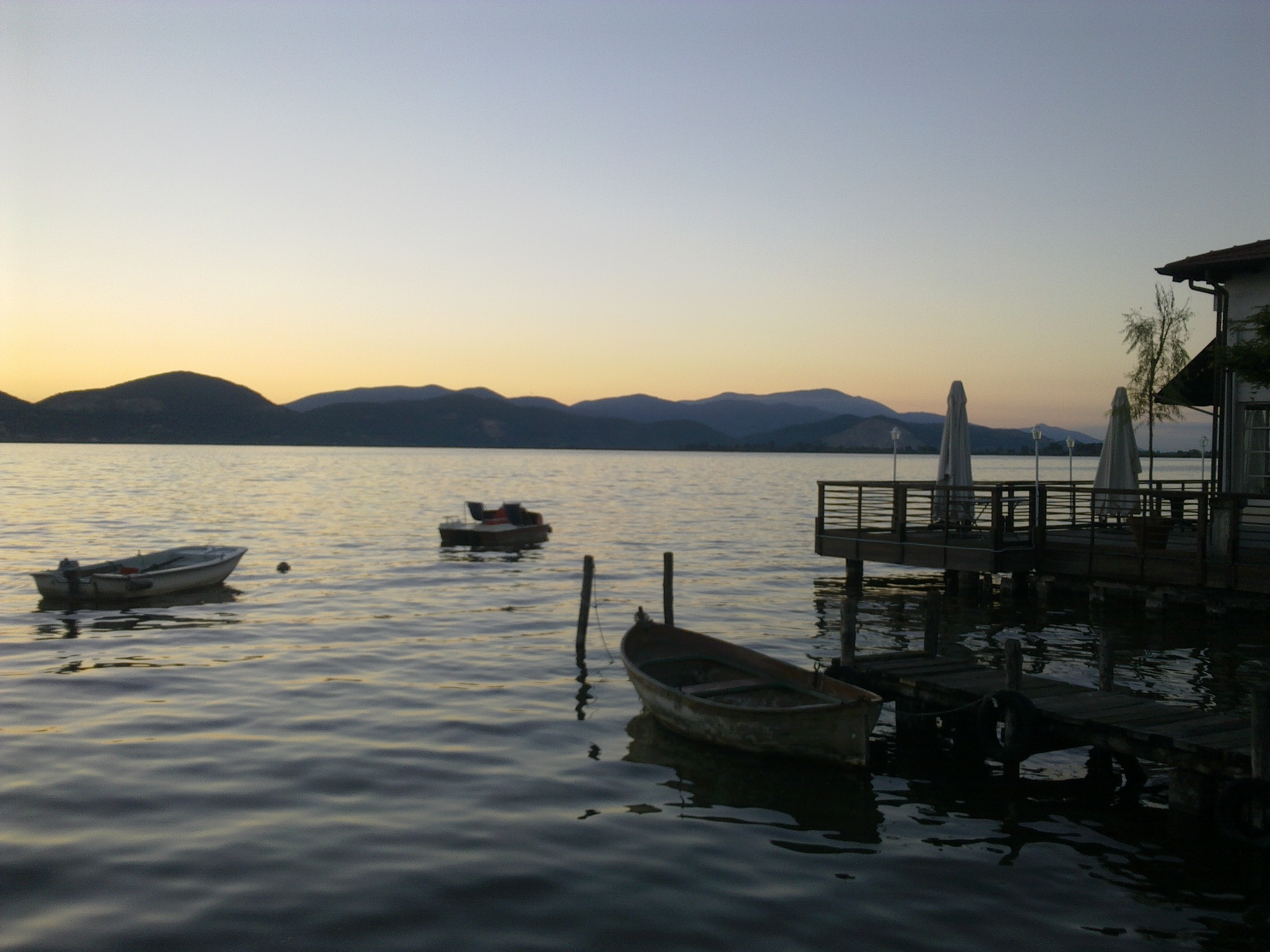 Auringonnousu Massaciuccoli järvellä